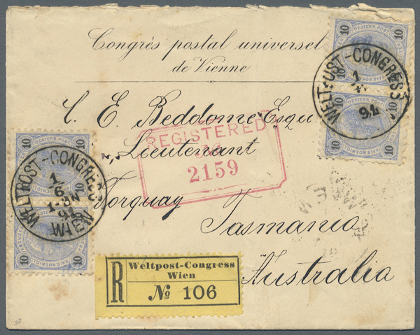 Einschreibebrief von 1891 vom Weltpostkongress in Wien. Zwei Paare 10 Kr. auf Vordruckbrief "Congres postal universel de Vienne” mit Sonderstempel "WELTPOST-CONGRESS 1/8 91” und Sonder-R-Zettel über "BRINDISI 3 6 91” und "HOBART JY 1 91” nach Torquay (heute East Devonport), Tasmanien, leichte senkrechte Faltung, sonst einwandfreie Erhaltung.